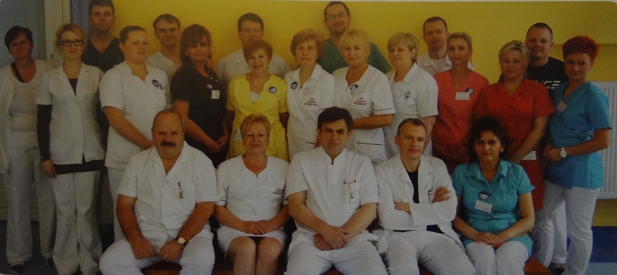 Szczecin, 2014 r. Oddział ortopedii i traumatologii narządu ruchu